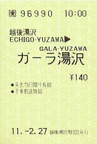 越後湯沢駅発 ガーラ湯沢駅行 乗車券。